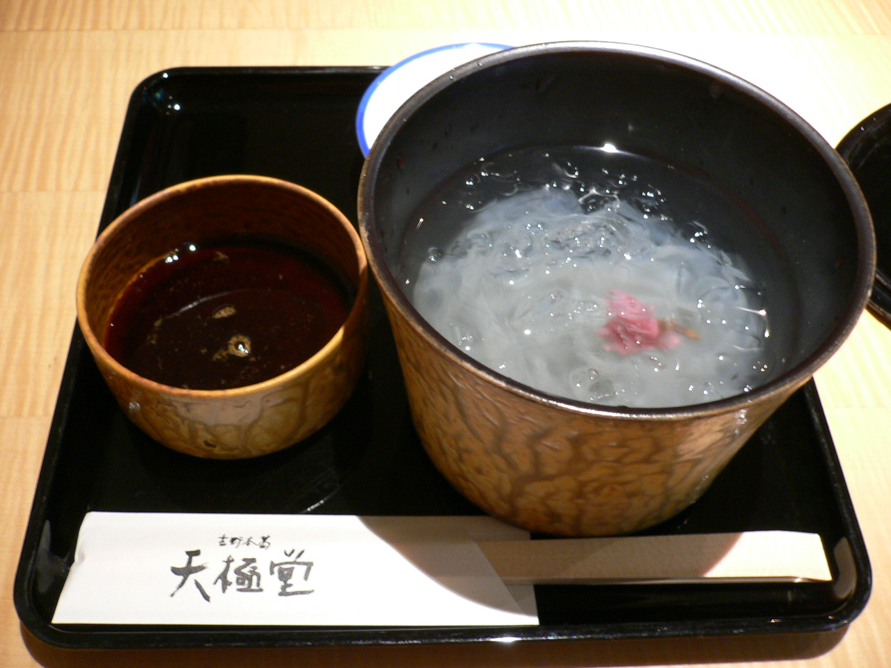 葛切り(奈良市押上町1-6、吉野本葛「天極堂本店」)